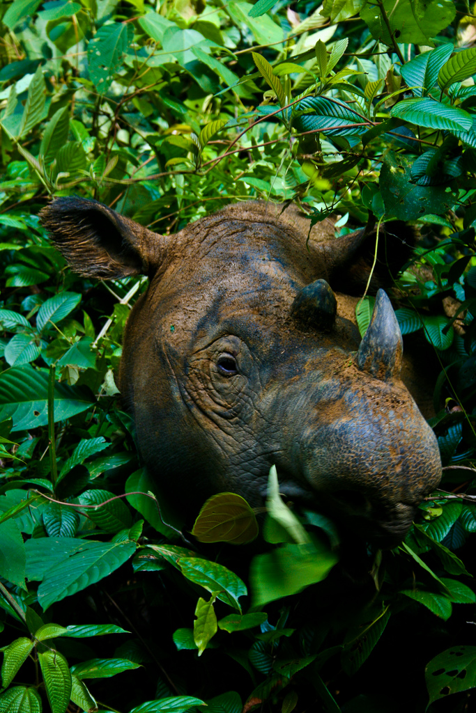 Rosa at SRS, Way Kambas, Sumatra